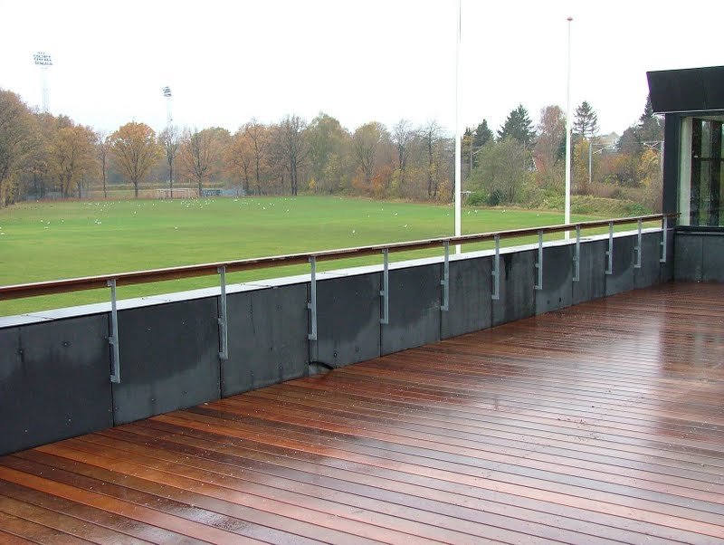 Tagterassen